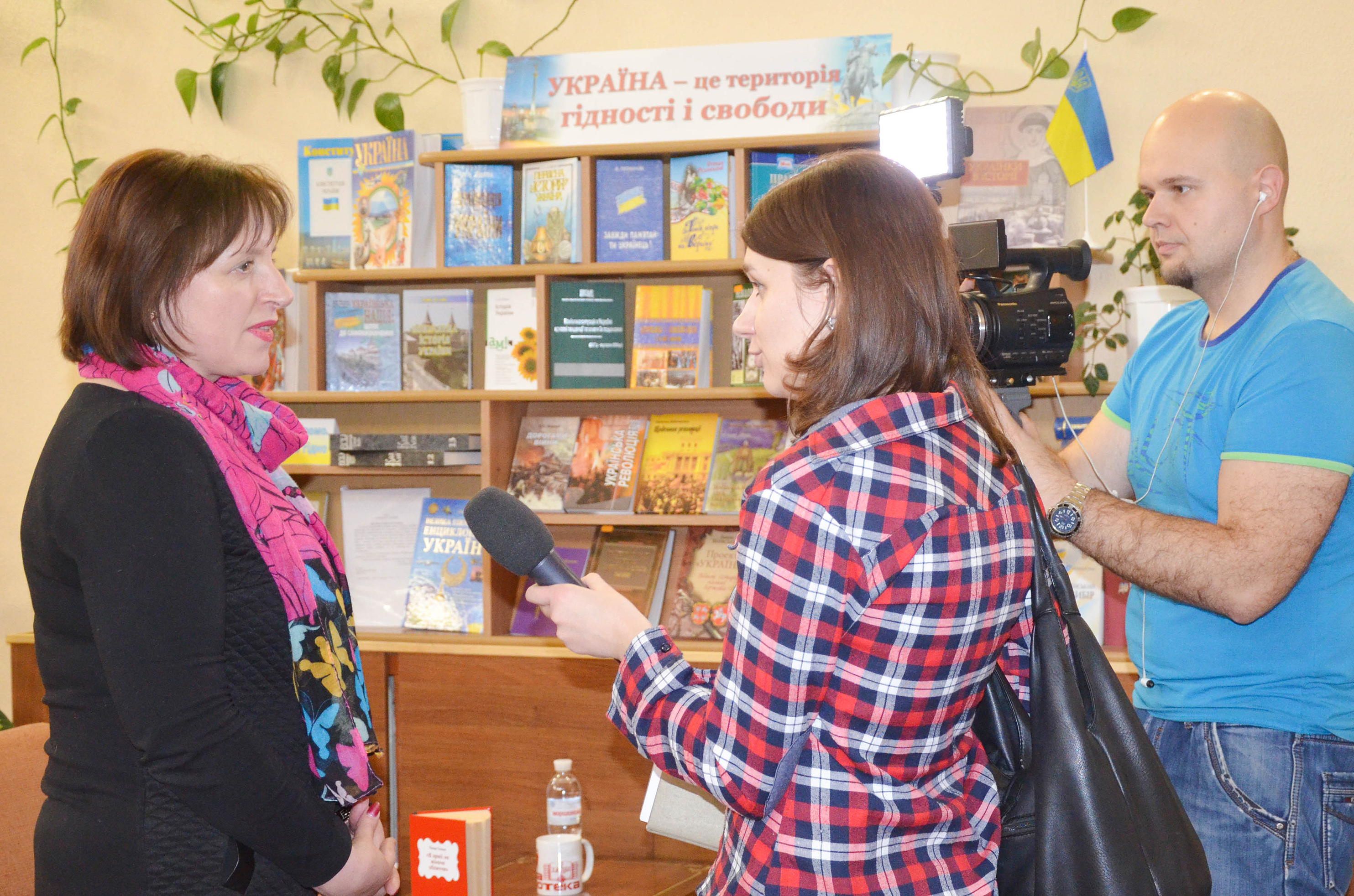 На початку 2016 році у приміщенні Центральної міської бібліотеки відбувся захід "Жива книга". На фотографії директор Хмельницької міської бібліотечної системи Т.С. Козицька с журналістами місцевого телеканалу.